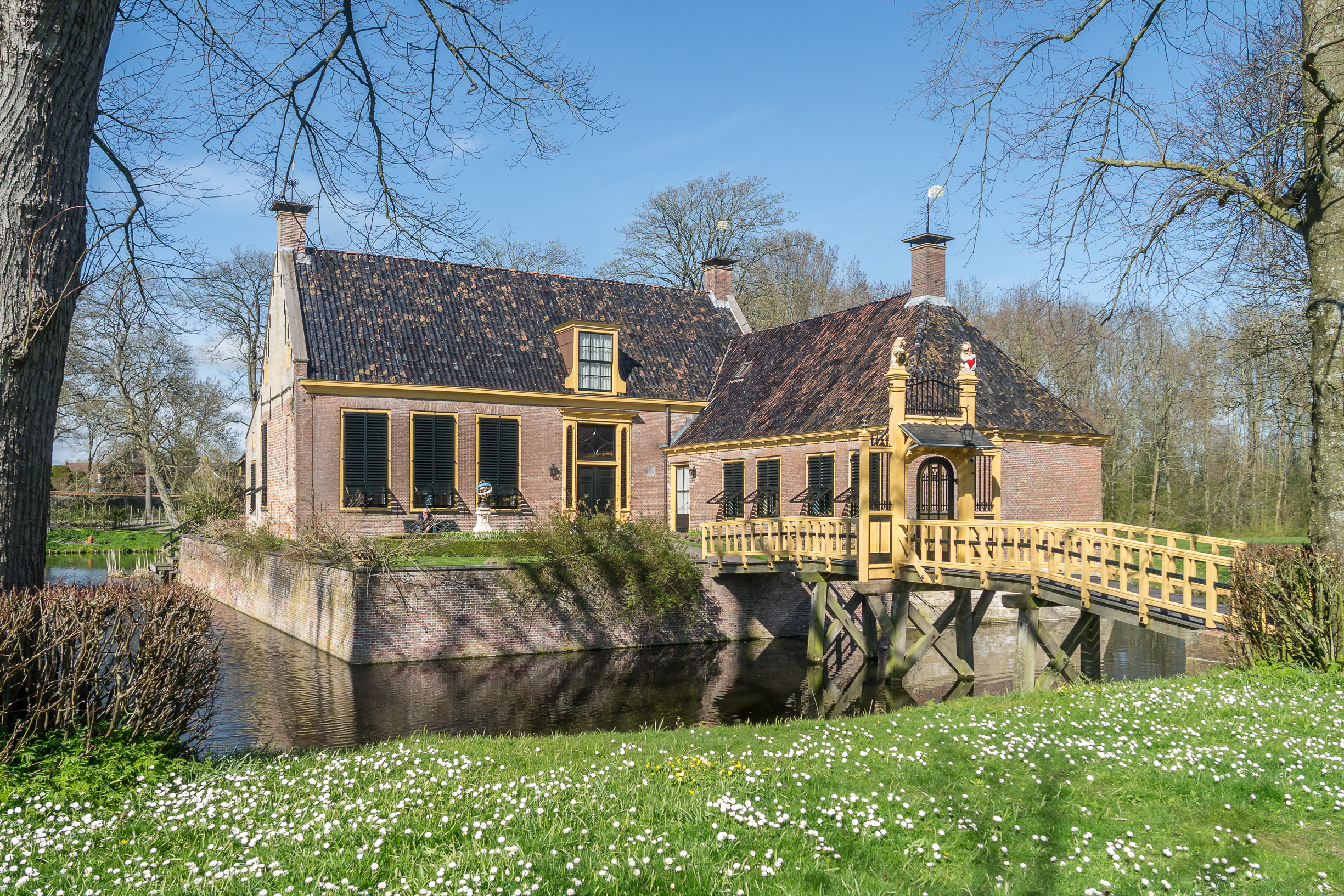 Dekemastate en brug